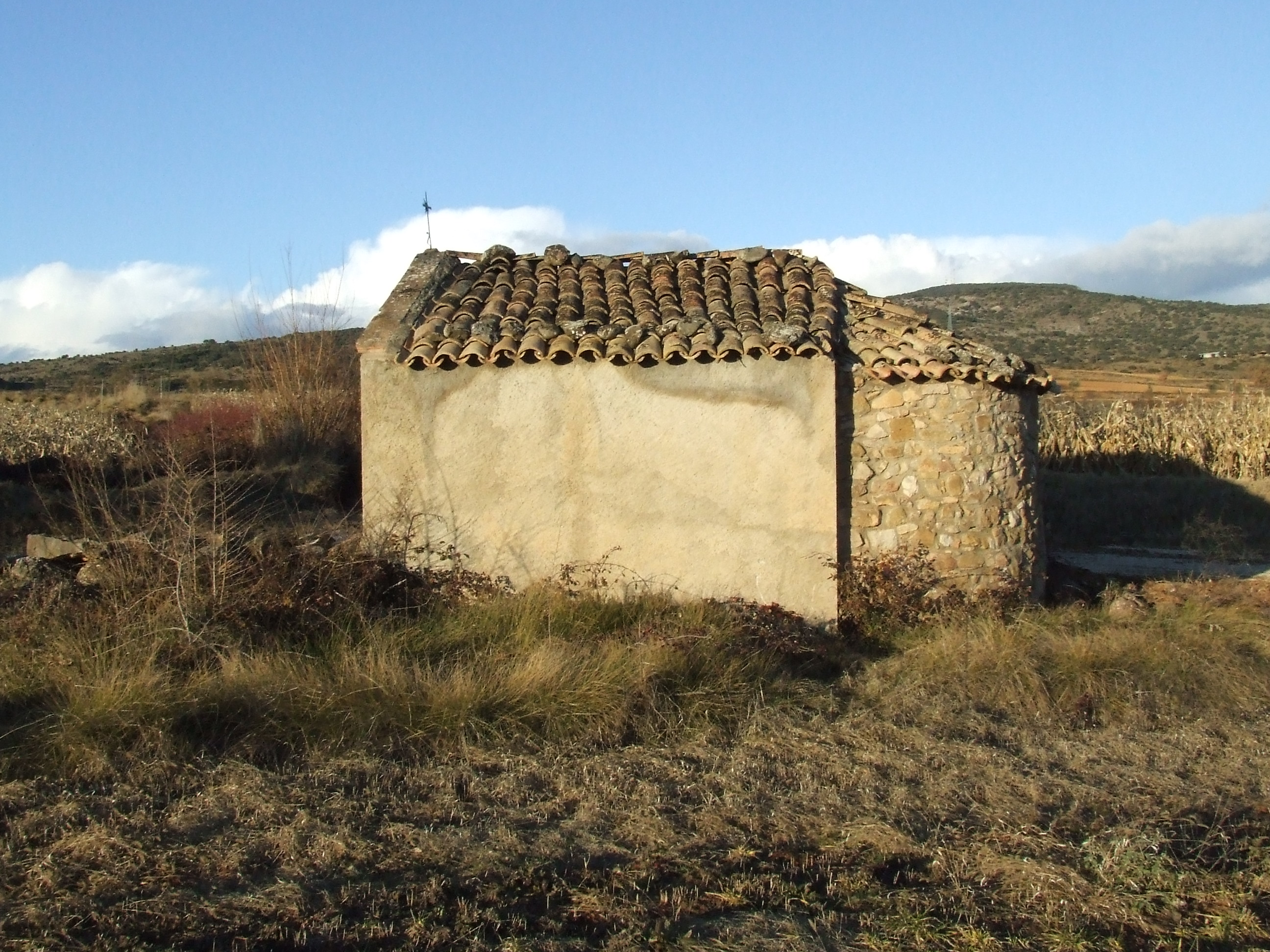 Mur meridional de Santa Llúcia de Vilamitjana (Tremp, Pallars Jussà)